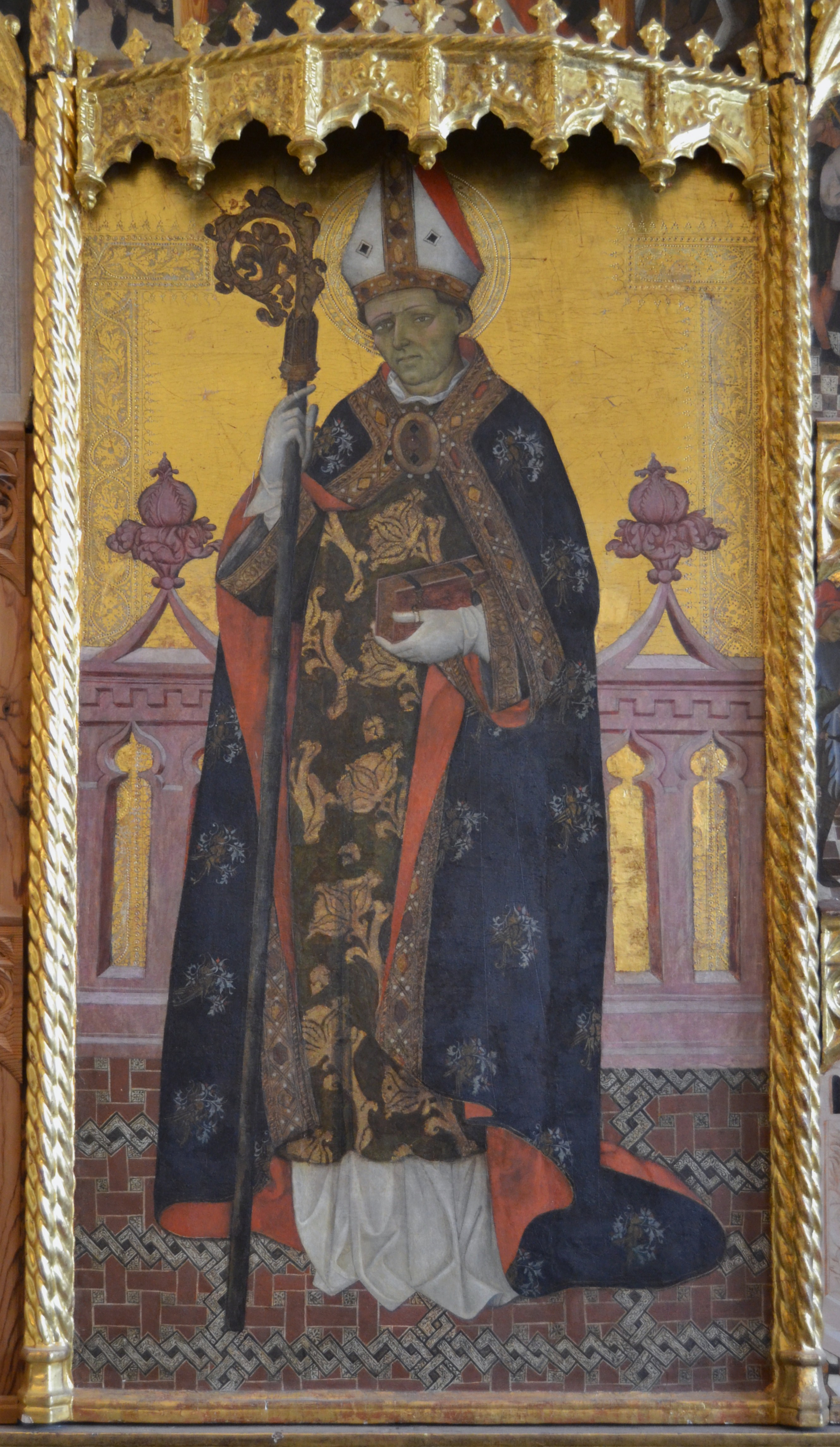 Taula central del retaule de sant Valeri de Jaume Mateu, ca. 1430 - 1440, tremp sobre taula, museu catedralici de Sogorb. Retaule amb diferents passatges de la vida de sant Valeri bisbe i el seu diaca sant Vicent, està presidit per la figura de sant Valeri amb vestidura i insígnies episcopals, completat amb la presència en un dels compartiments dels sants Abdó i Senén, perdut en 1936, juntament amb el que representava la deportació de sant Valeri i sant Vicent. Corona el retaule al carrer central el Calvari i sobre ell la figura de Crist beneint. Als carrers laterals hi figuren l'arcàngel Gabriel i la mare de Déu anunciada, situats, com el Crist beneint, en capelletes sobre els campers o fons dels remats dels carrers. A la predel·la, hi apareixen el Crits baró de Dolors al centre i la mare de Déu Dolorosa i Joan evangelista als dos costats, juntament a huit figures de sants i santes asseguts portant els atributs que els identifiquen. Al guardapols hi han figures de profetes i àngels amb escuts, segurament del fundador del benefici de sant Valeri i del donant del retaule. El retaule degué romandre a la seua capella del claustre fins ben entrat el segle XIX, quan l'església de la Vall d'Almonesir, acabada el 8 de novembre de 1689, fou incendiada per primera vegada el 10 de desembre de 1839 durant la primera guerra carlista i per segona vegada el 1870 durant la tercera guerra carlista. En un d'aquests anys, davant la falta de retaules i ornaments a l'església d'aquesta població, el capítol de la catedral de Sogorb va cedir el retaule a la parròquia.